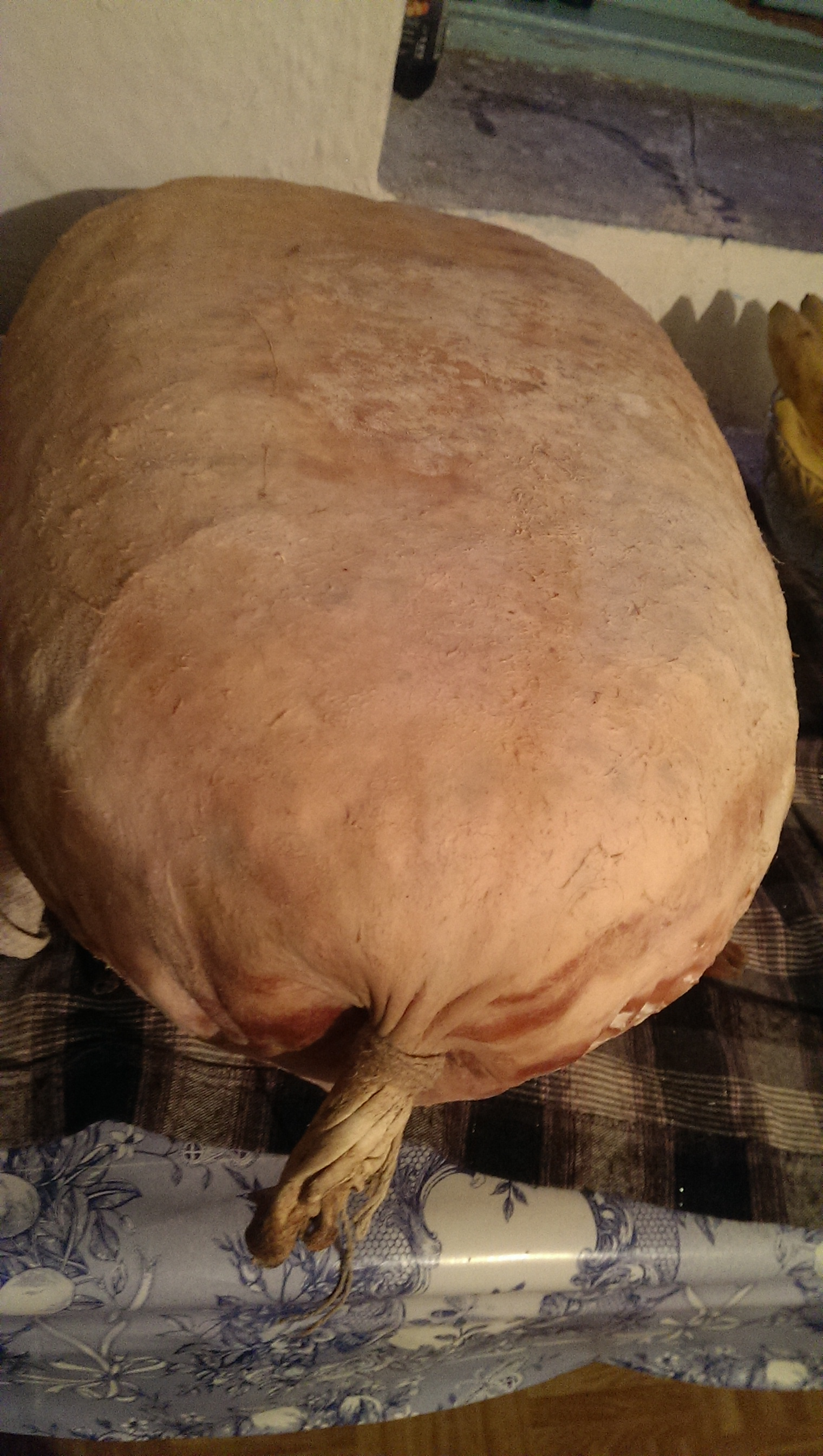 Мијех сира